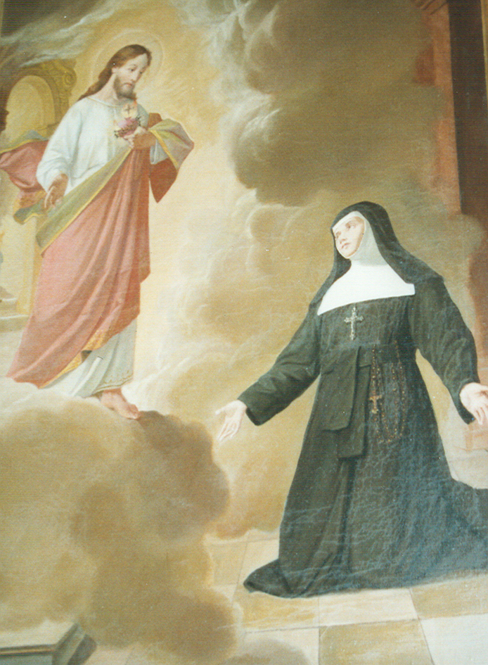 Jesus erscheint der hl. Margareta Maria Alacoque, Gemälde am Seitenaltar der Spitalkirche von Eferding, Oberösterreich